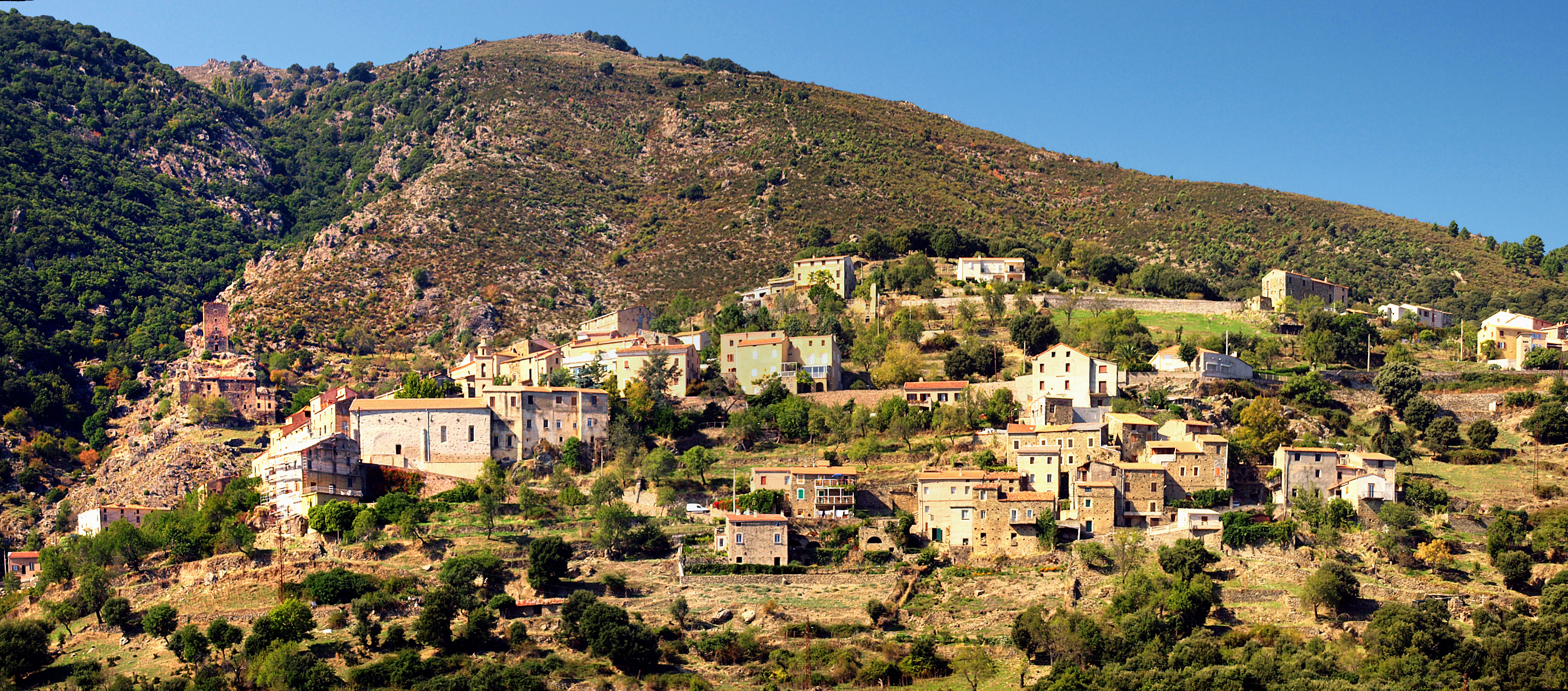 Castifao - Panorama sur le village